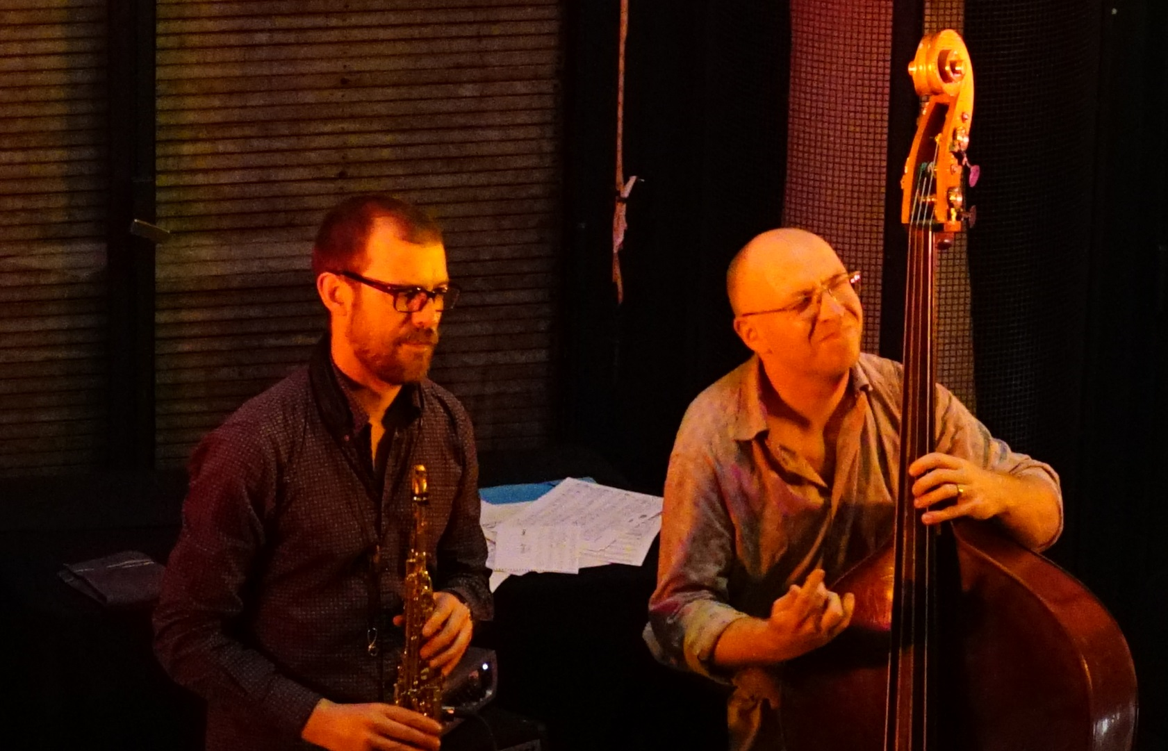 En concert à la Villa Douce à Reims.